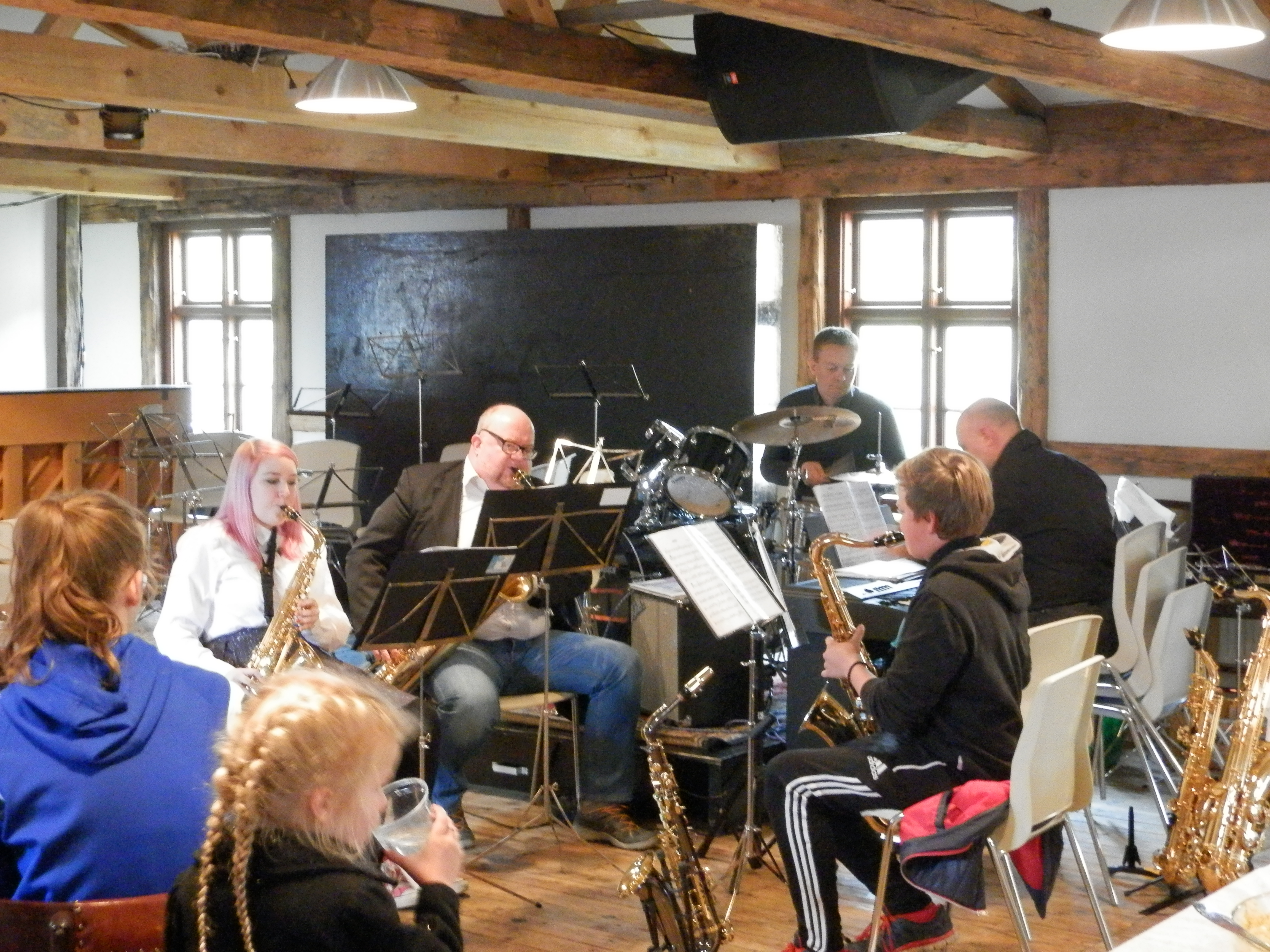 Føroyskt: Orkestur frá Suðuroyar Musikkskúla spælir á Seglloftinum á Tvøroyri á jóansøku 2015.